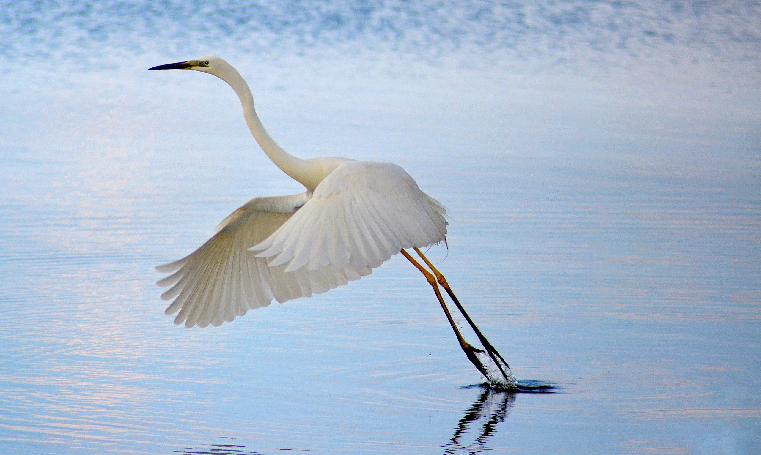 Дунайський біосферний заповідник, Кілійський р-н, м. Вилкове, вул. Татарбунарського повстання, 132 а